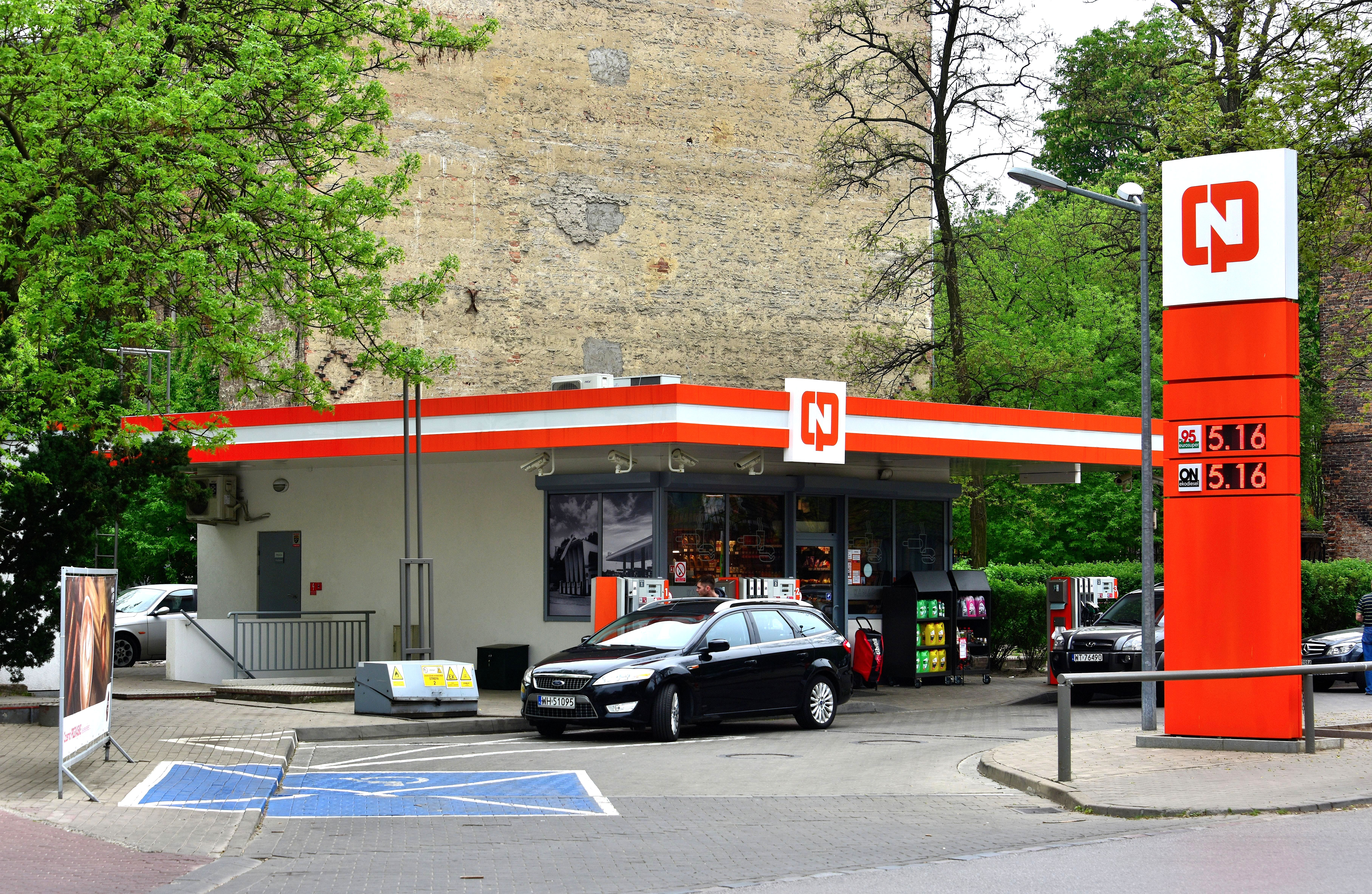 Stacja PKN Orlen pod marką CPN przy ul. Markowskiej w Warszawie